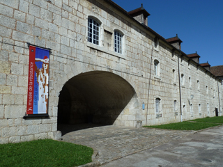 Entrée du Musée de la Résistance et de la Déportation